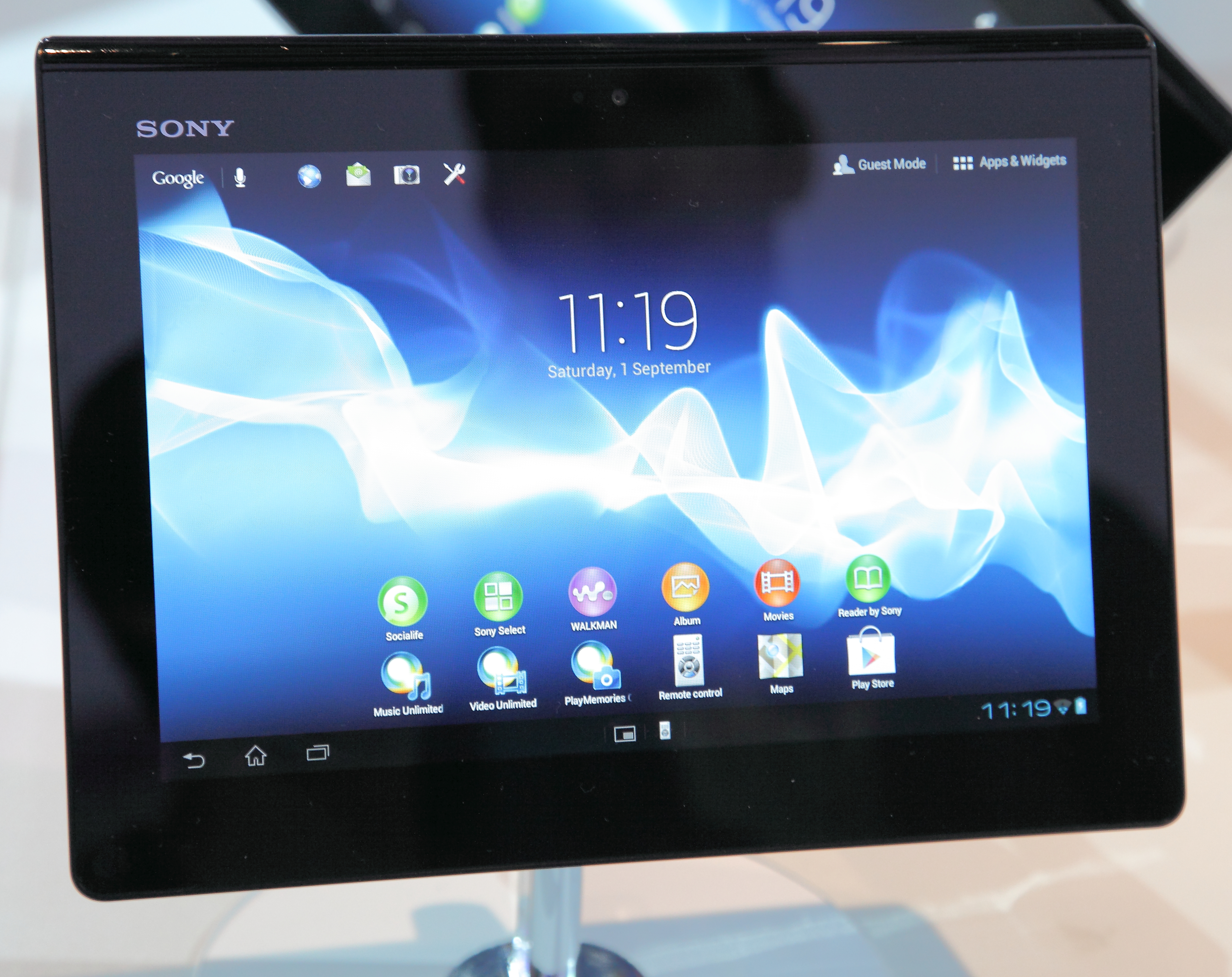 Xperia Tablet S; SGPT12/SGPT13 (SPGDS4); bei Sony auf der Internationalen Funkausstellung 2012 in Berlin